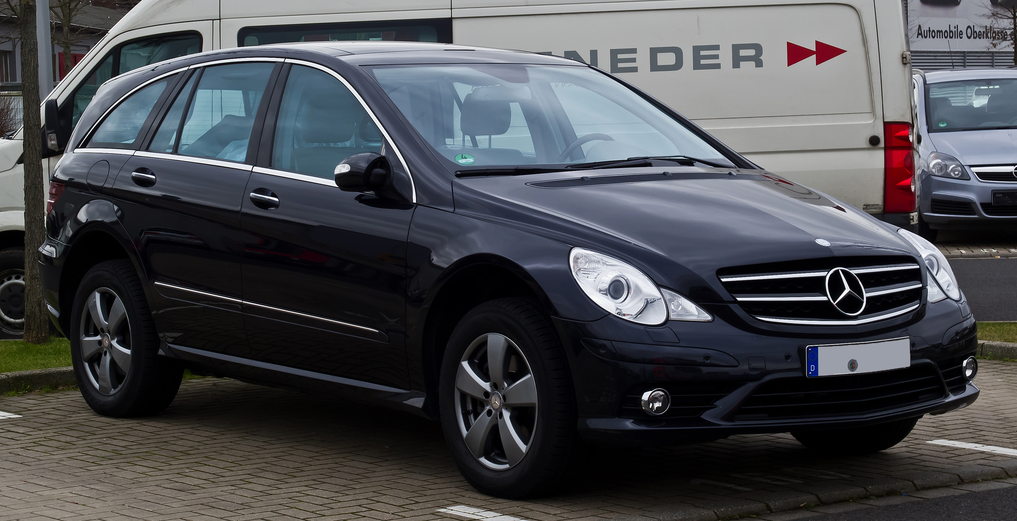 Mercedes-Benz R 500 4MATIC (W 251, 1. Facelift)